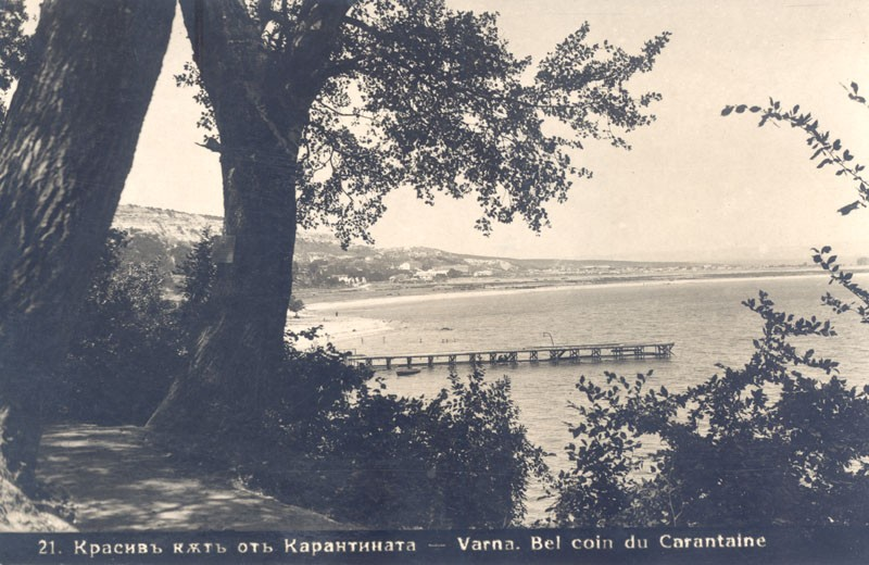 Красив кът от местността Карантината във Варна. На заден план се вижда село Сес Севмес, дн. квартал Аспарухово.